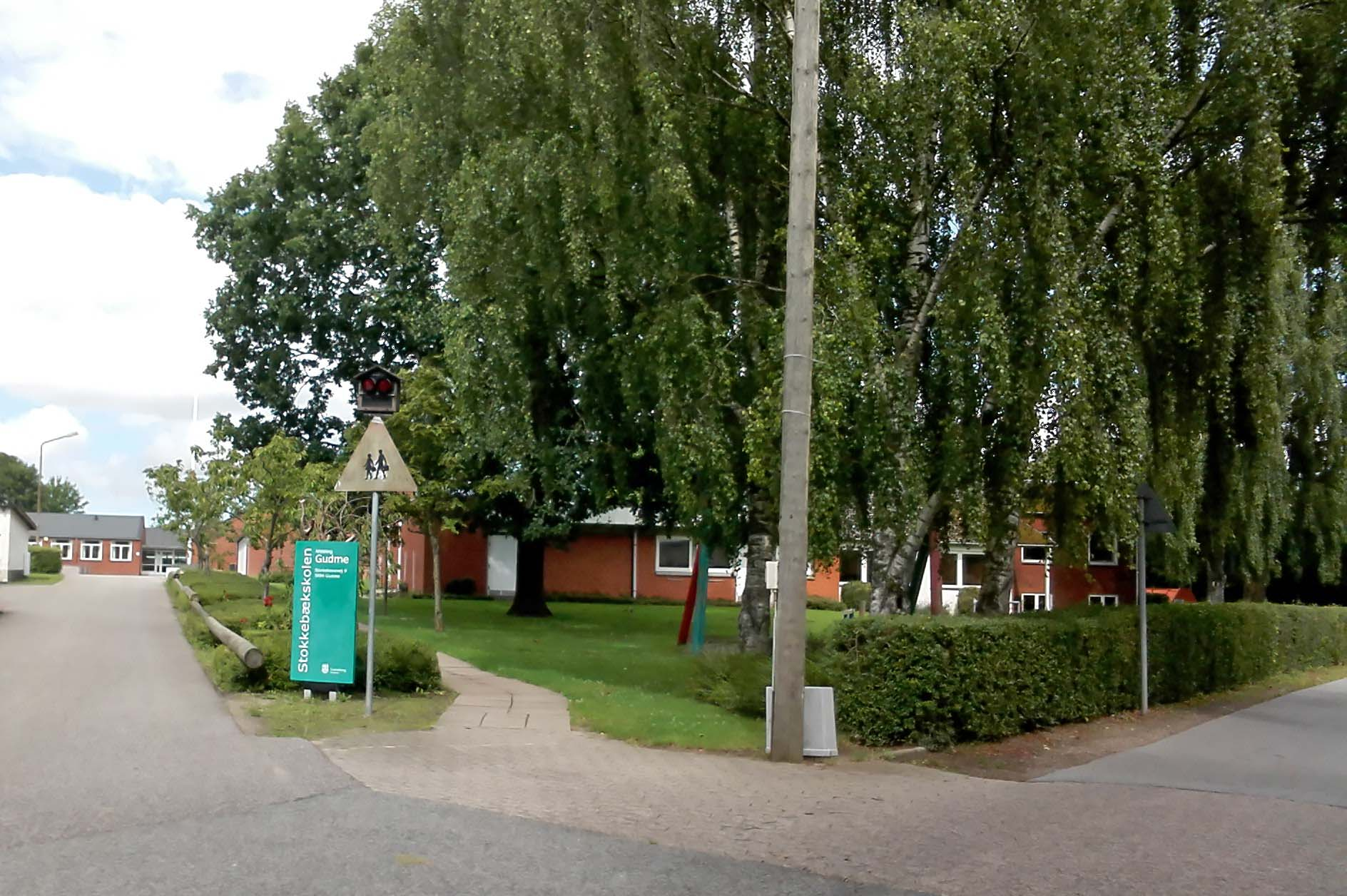 Stokkebækskolen i Gudme